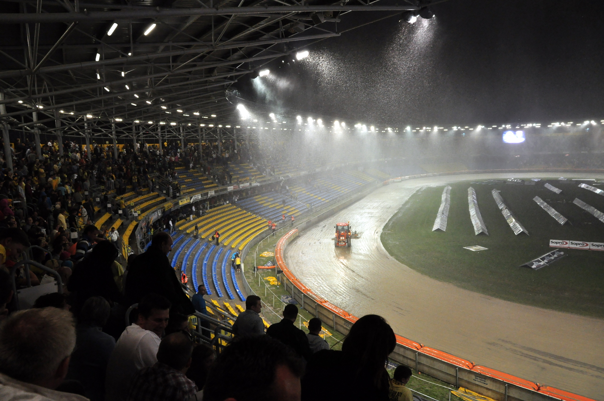 Gorzów Wlkp. - 11. 09. 2011 r.. Derby nr 75 przerywa gwałtowna burza.